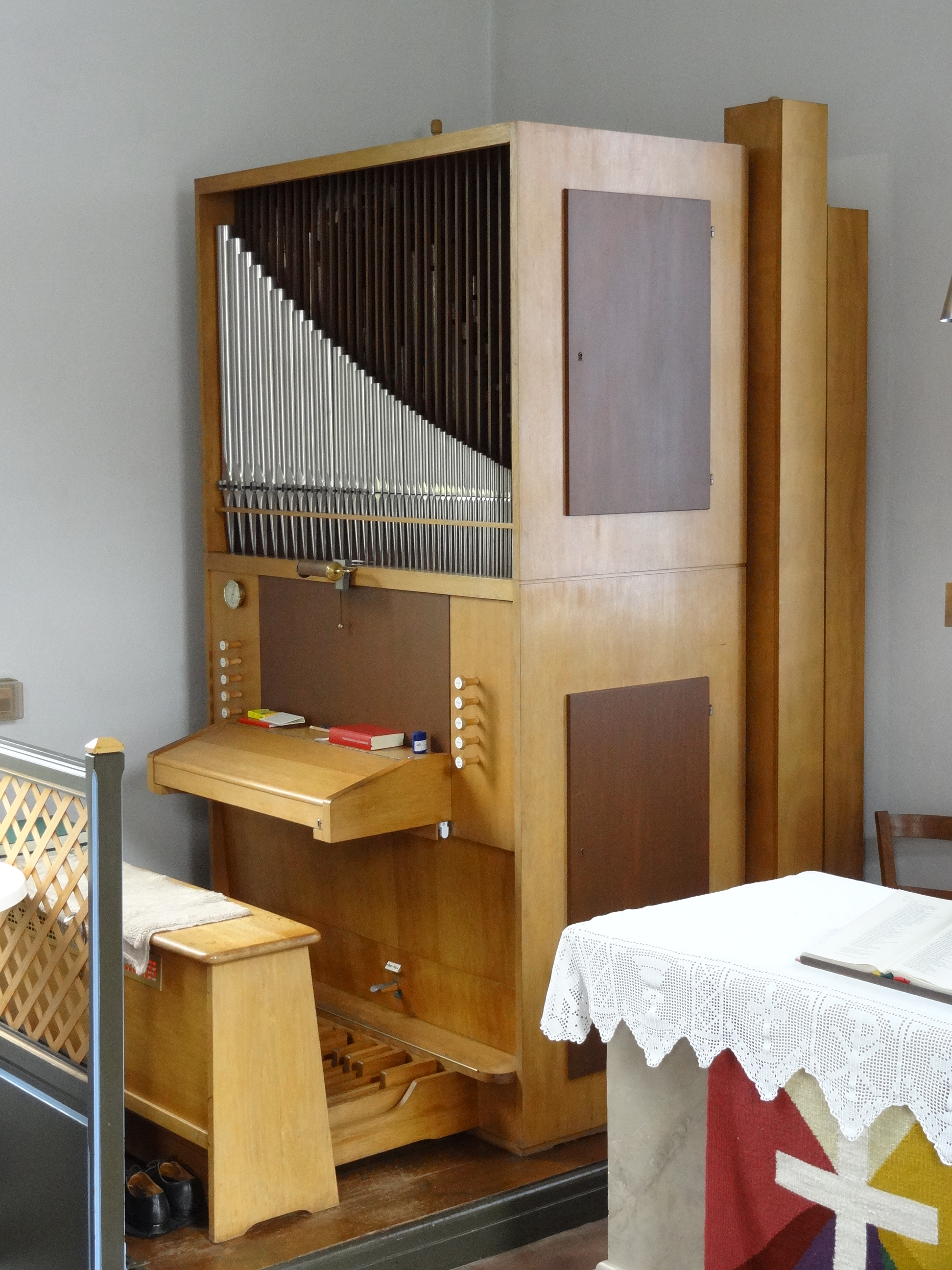 Evangelische Kirche (Hausen-Oes)